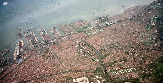 Tanjung Priok - Jakarta - Indonesië